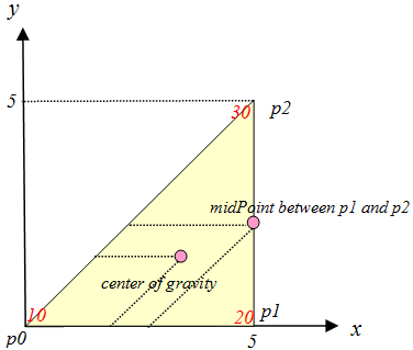 補間の例題